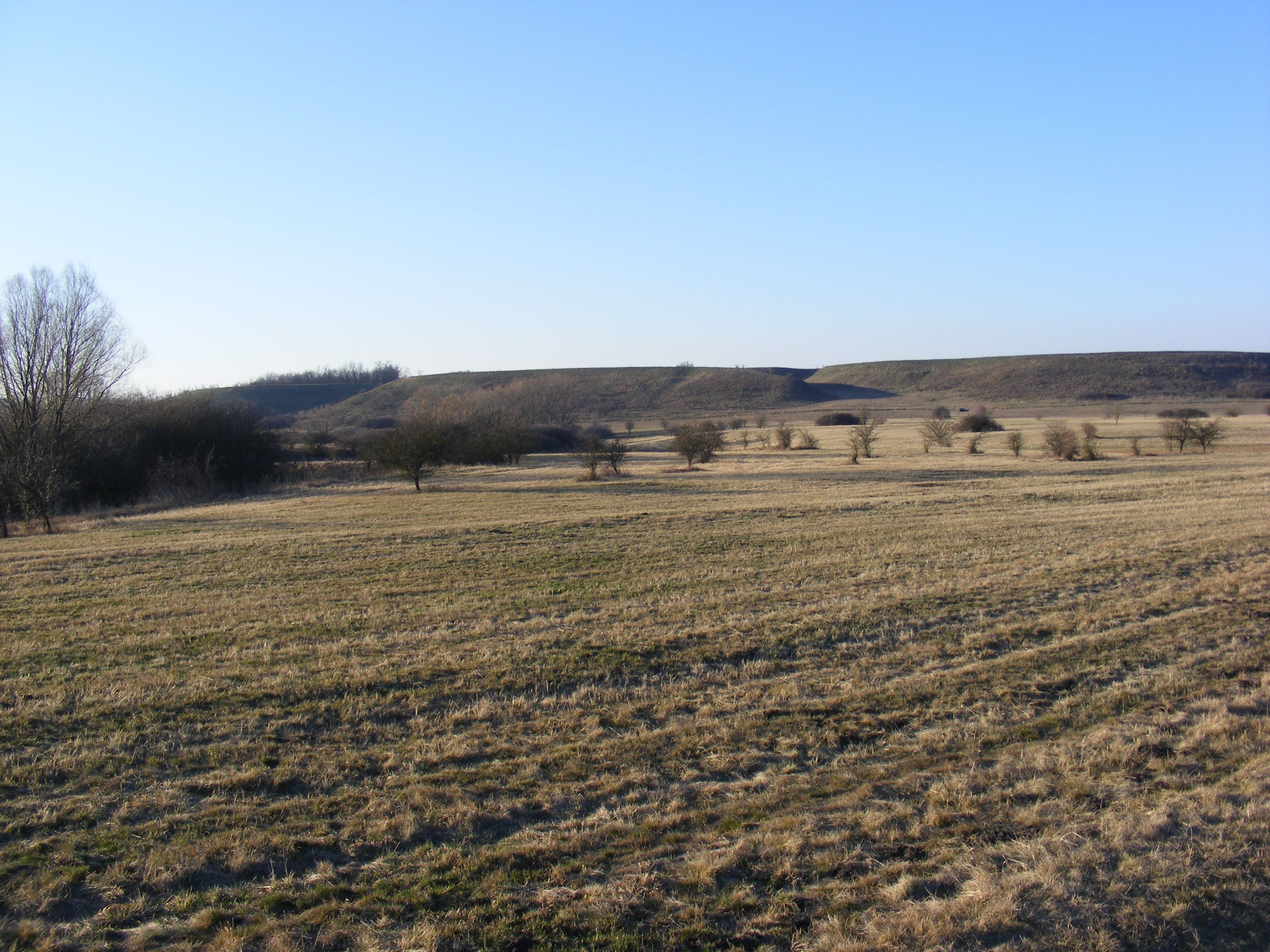 Partalja1